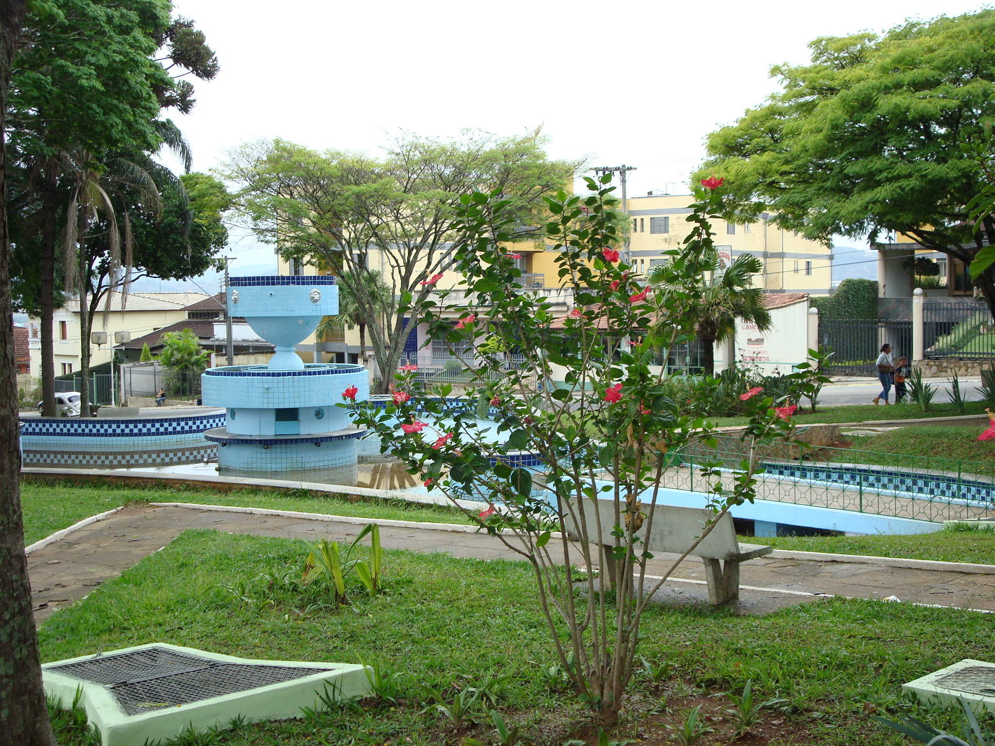 fonte luminosa da praça menote da áurea